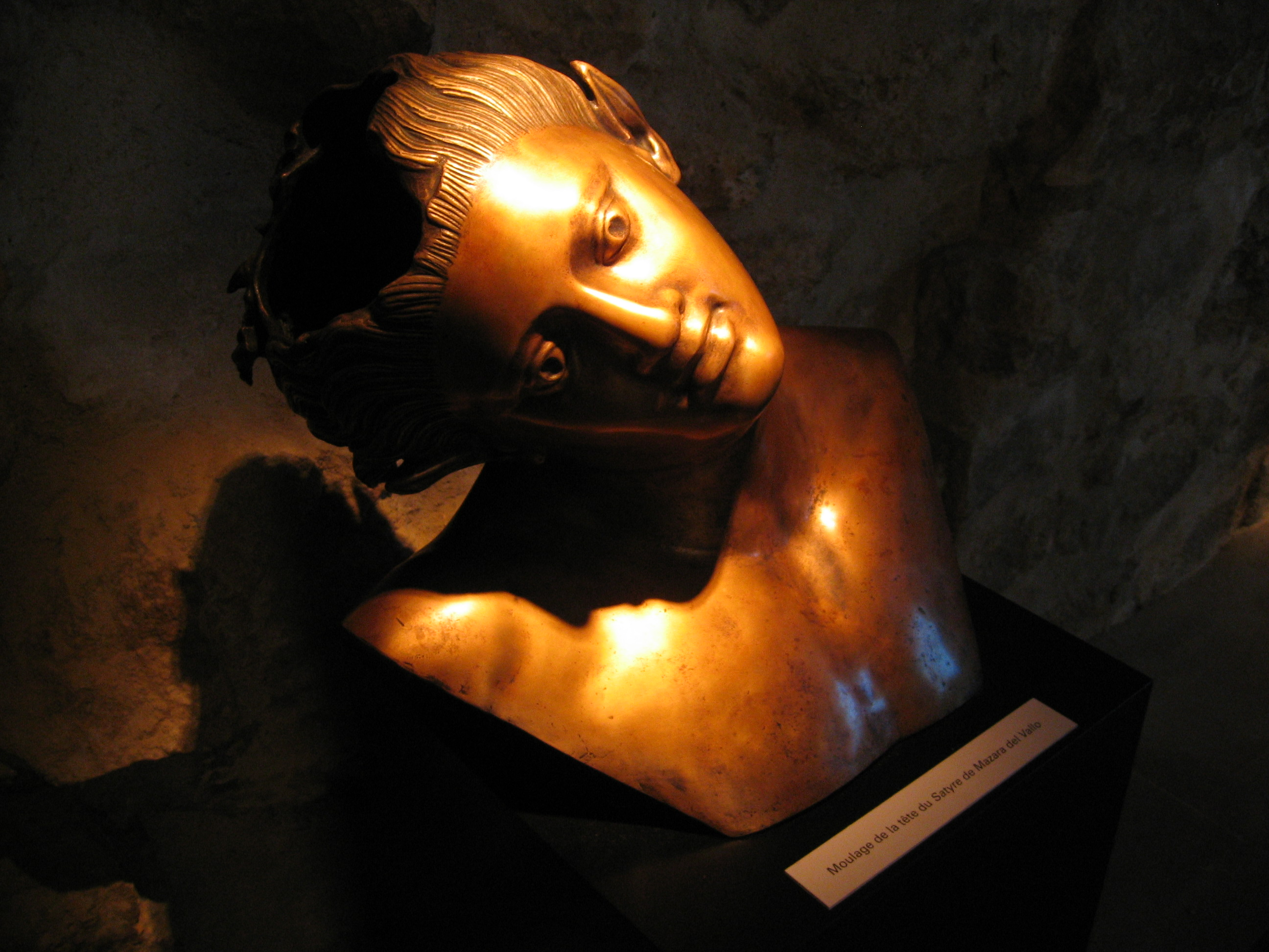 Satiro danzante di Mazara del Vallo. Calco della testa, esposto al Louvre nel corso dell'esposizione consacrata a Prassitele: «L'opera originale fu ripescata nel canale di Sicilia in due tappe: dapprima la gamba sinistra nella primavera 1997 e, dopo quasi un anno, il corpo senza gambe né braccio. Rappresenta una figura mitologica, un demone del corteo orgiastico che accompagna Dioniso, il dio del vino e dell'ebrezza. La scultura, di dimensioni più grandi che in natura, è stata attribuita a Prassitele ma la sua datazione resta controversa.».